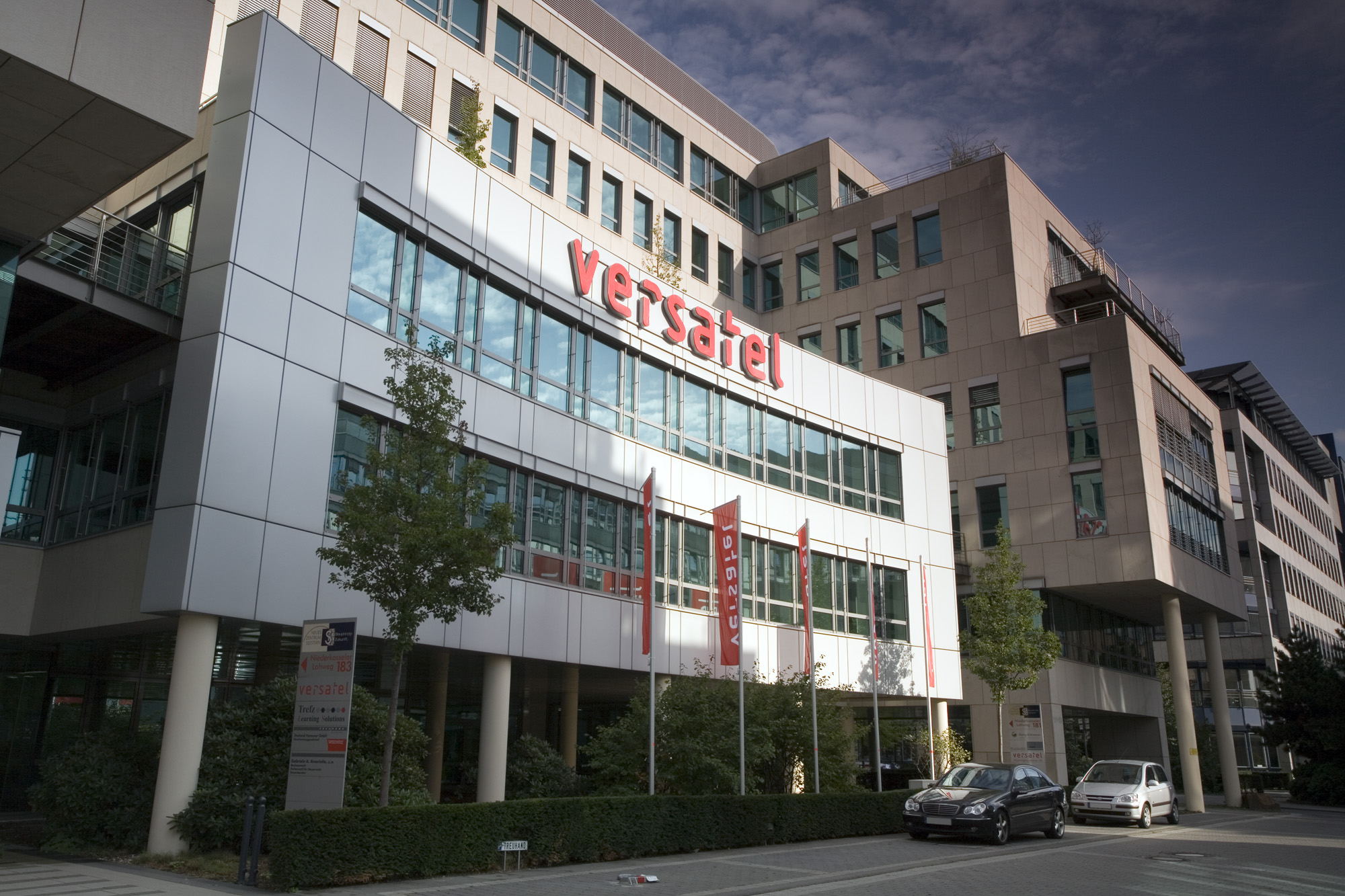 Die Zentrale der Versatel AG in Düsseldorf